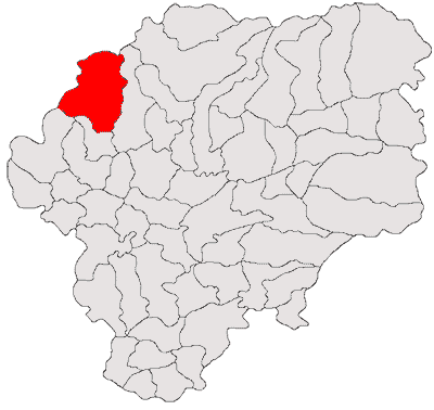 Categorie:Hărţi ale judeţului Bistriţa-Năsăud